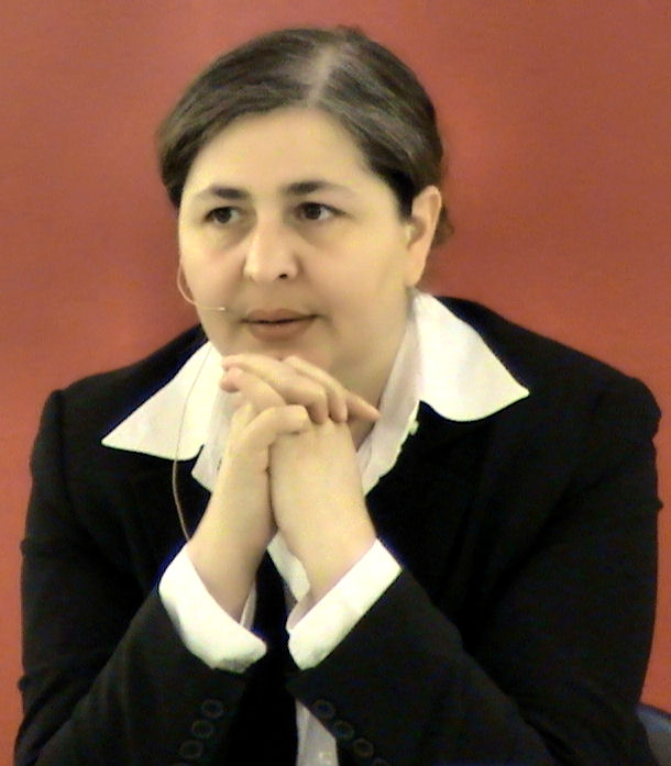 Autorin Serap Çileli